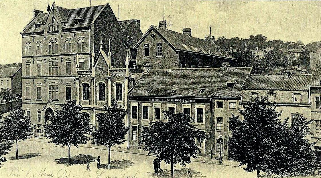 Ursulinenkloster und Ursulinenschule mit Pensionat an der Straße Bergdriesch in Aachen